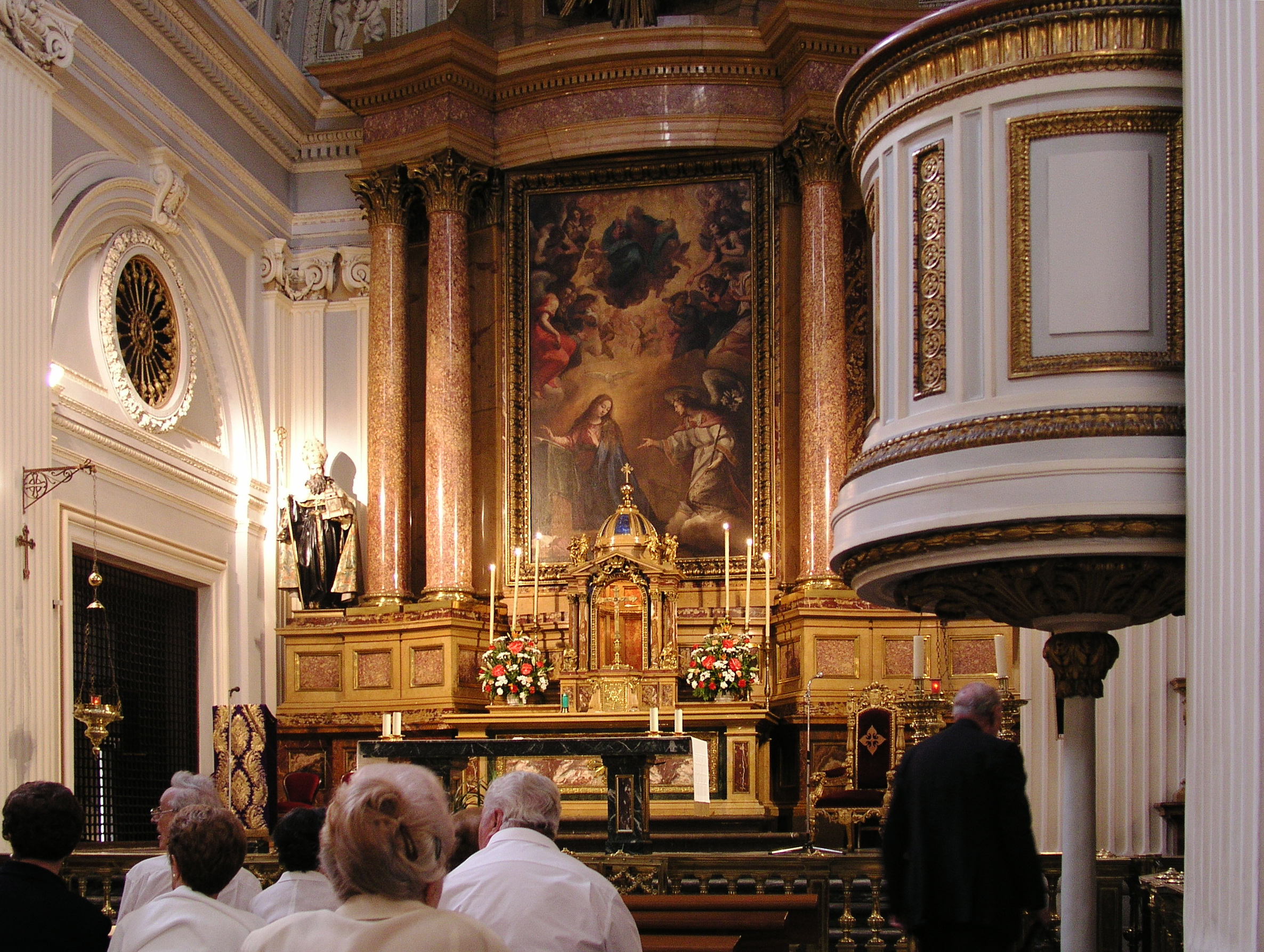 Real Monasterio de la Encarnación, Madrid, Spain